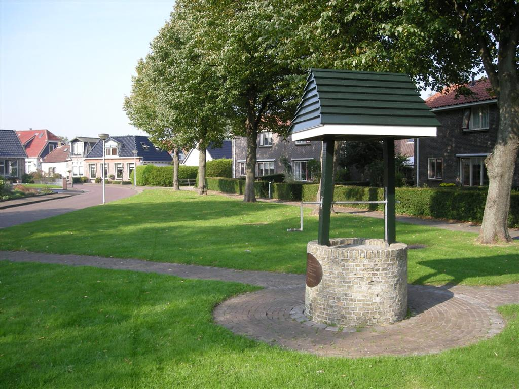 Gedenkteken voor Egbert Douwes in Idskenhuizen